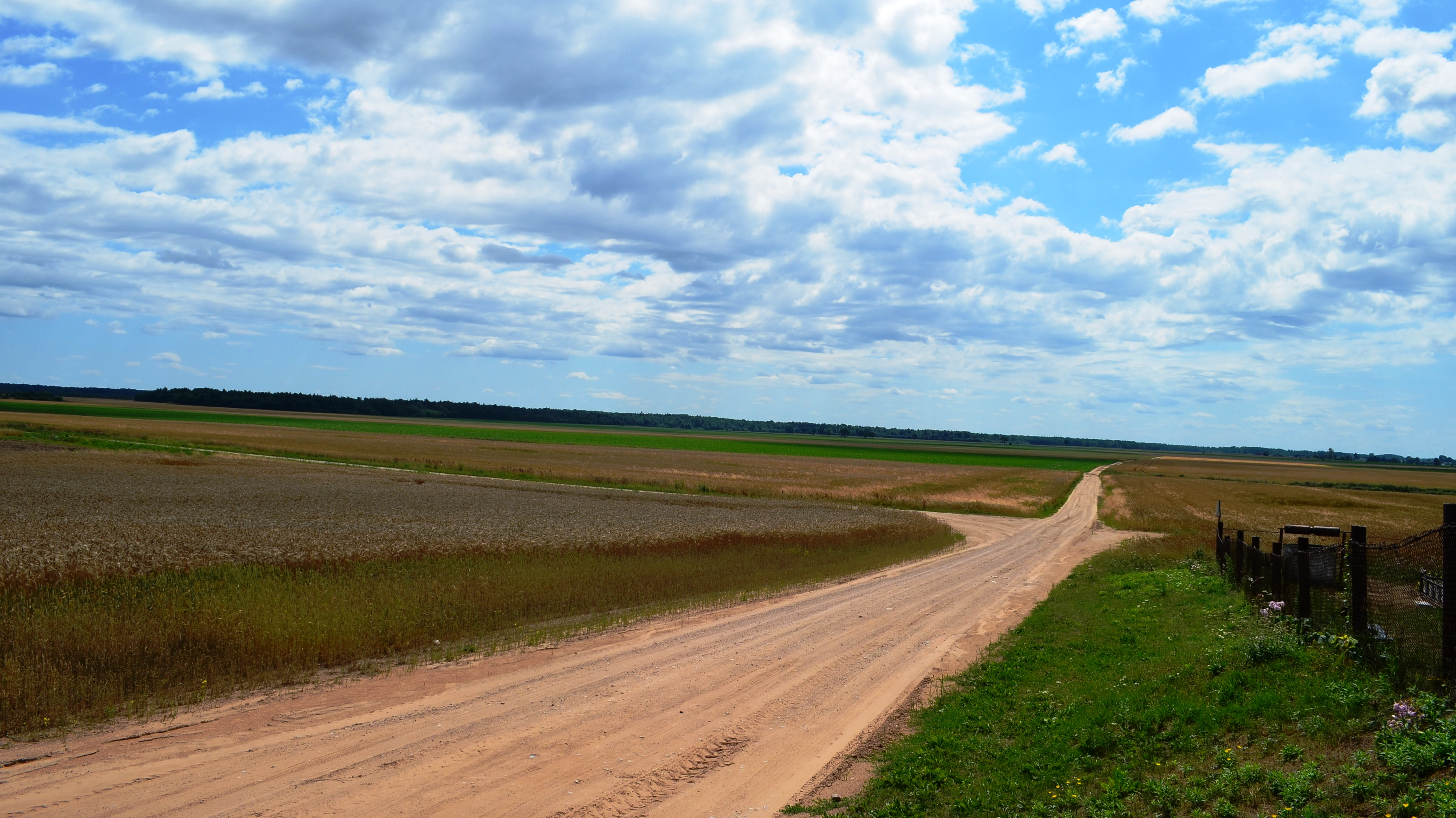 Laukai tarp Pėdžių ir Žiogaičių. Kėdainių raj.